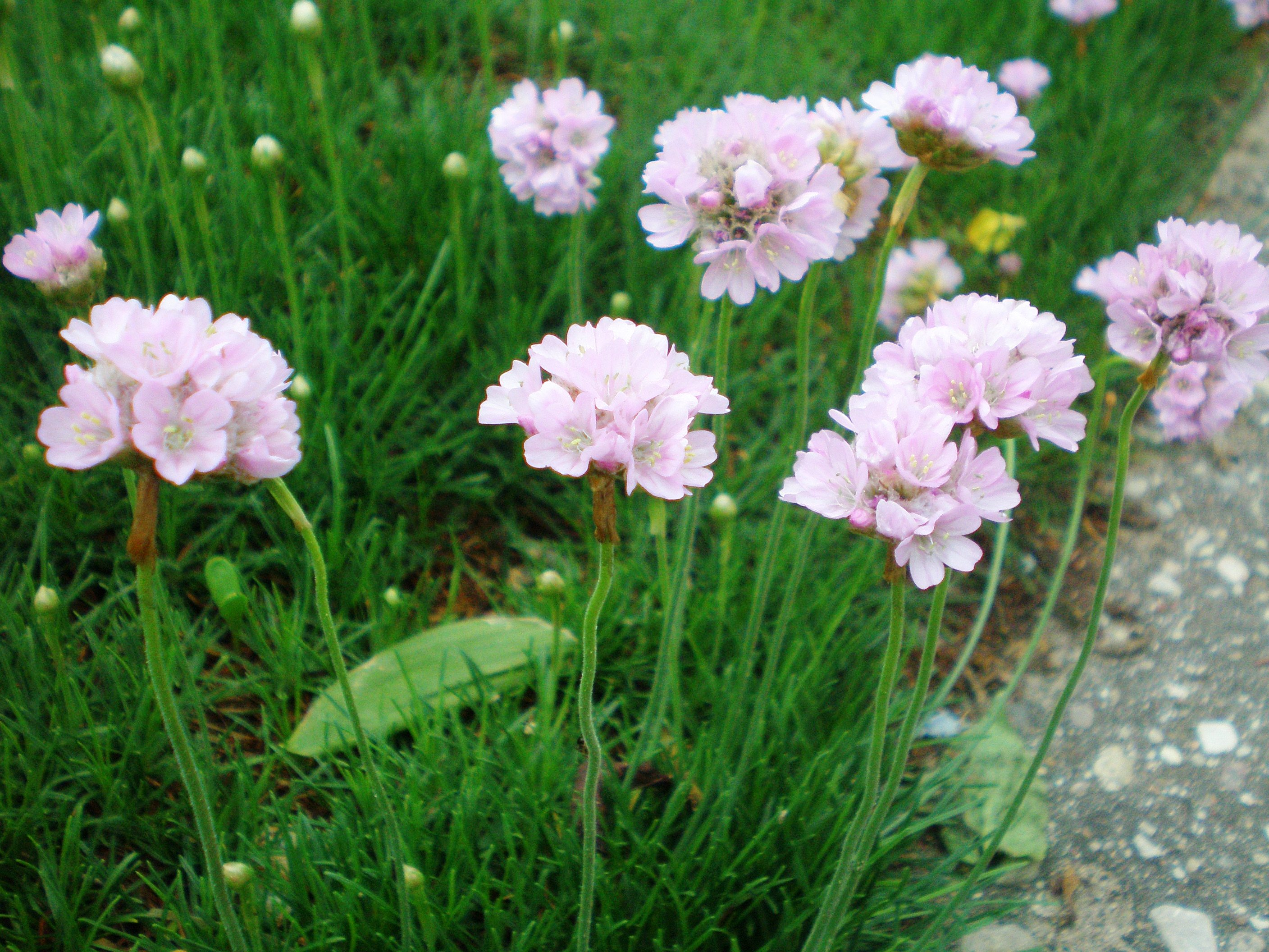 Armeria maritima